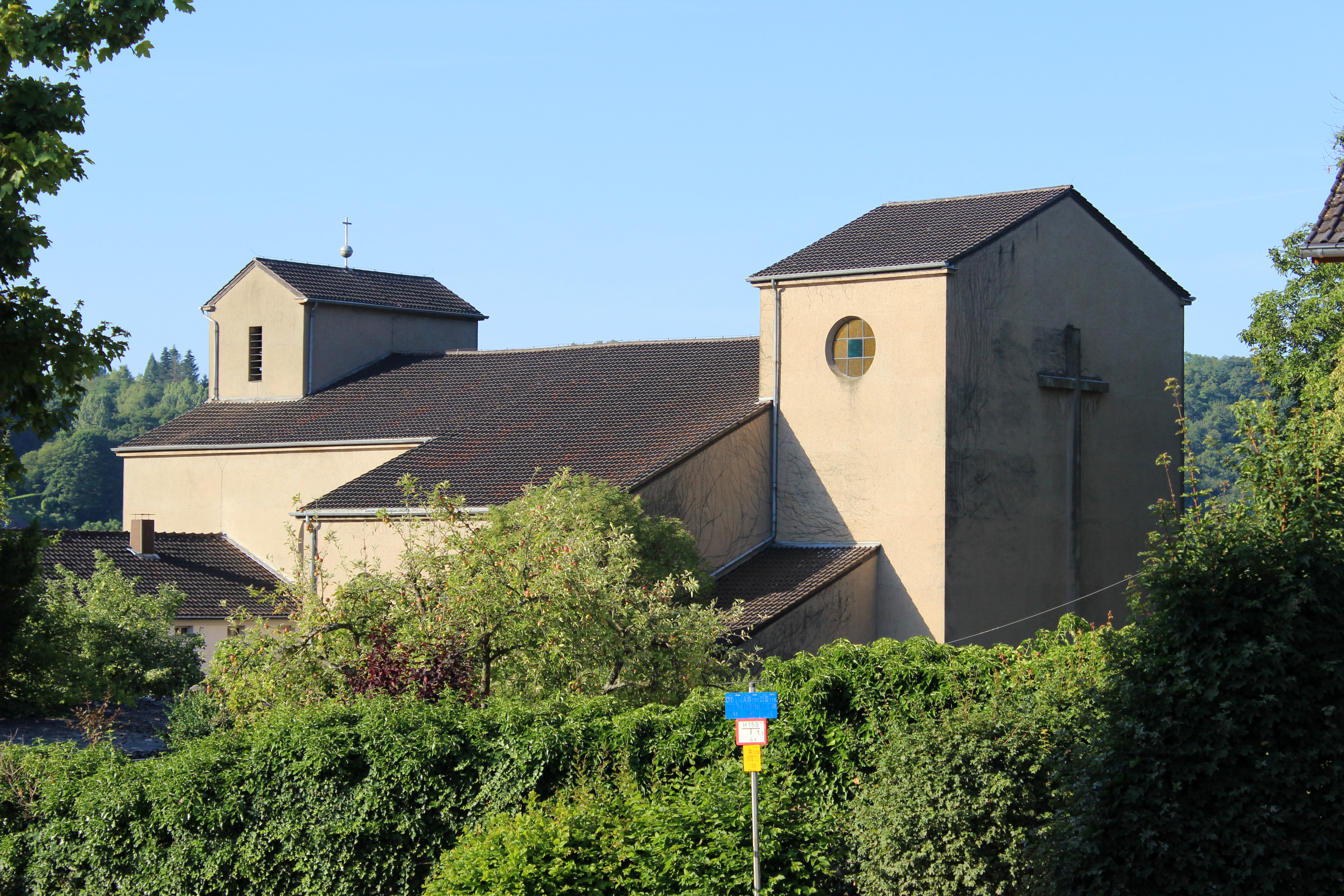 Die katholische Pfarrkirche St. Agatha in Merchingen, einem Stadtteil von Merzig, Landkreis Merzig-Wadern, Saarland.